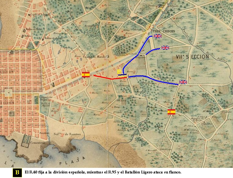 Combate del Cordón, 2° fase (1807)